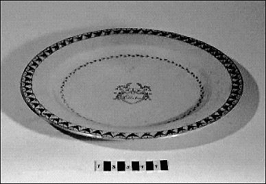 Fat till bålskål, Ellsboporslin, GSM. Bålskål med fat, bilden visar endast fat. Av ostindiskt vitt porslin med målad dekor. Utvändigt: draperibård i lila och guld runt kanten, sköld med namnet "Ellsbo" omgiven av små gula blommor och gröna blad. Invändigt: bladranka i guld och grönt runt kanten. Punschbål med fat ur en större servis beställd av Frederik Magnus Åkerman som 1790 blev ägare till Ellesbo herrgård i Rödbo socken på Hisingen, Bohuslän.